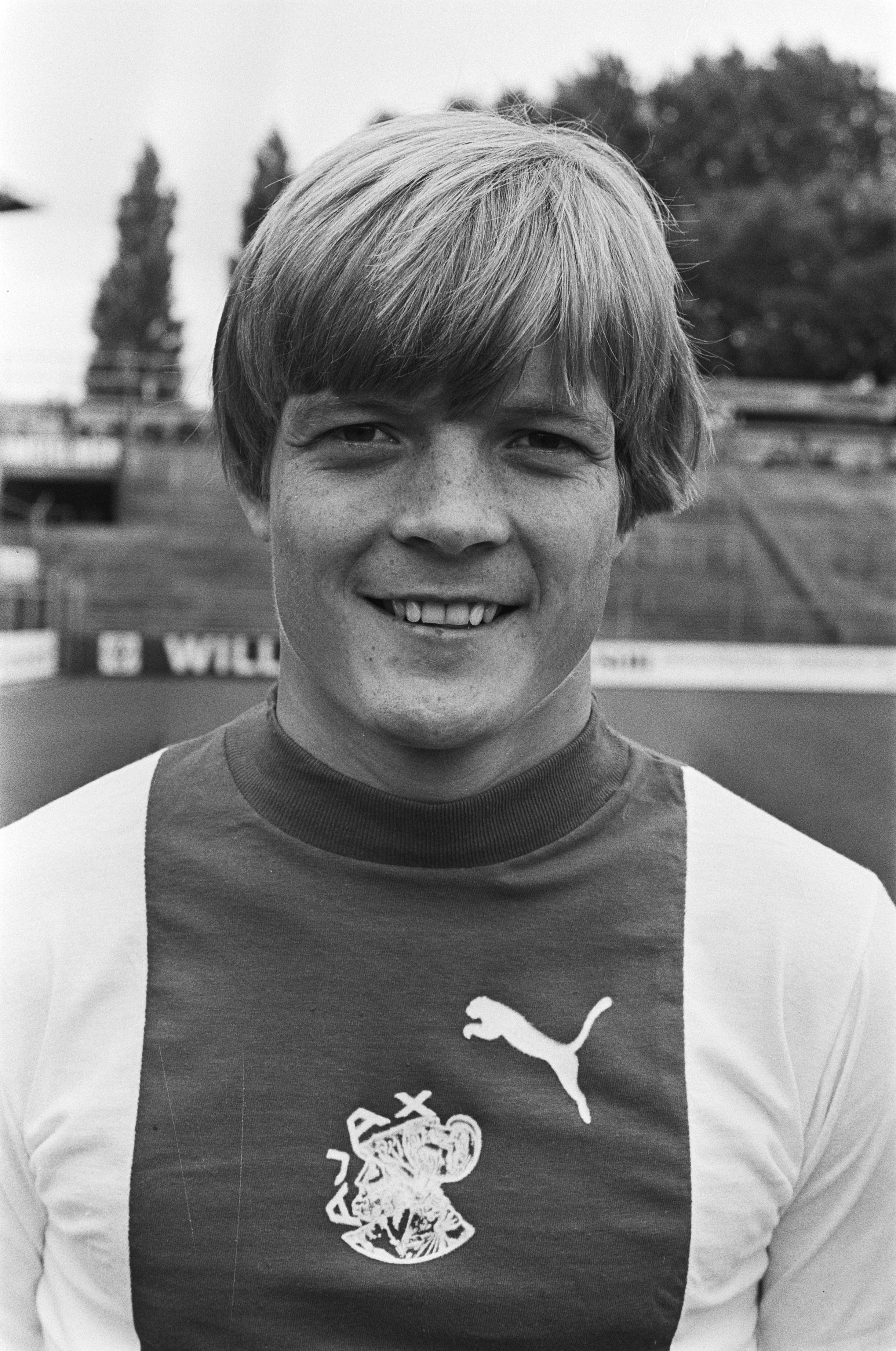 Collectie / Archief : Fotocollectie Anefo Reportage / Serie : [ onbekend ] Beschrijving : Ajax presenteert nieuwe selectie (Amsterdam); nr. 15, 16 Lerby, nr. 17 ?, nr. 18 Notten (koppen) Datum : 13 juli 1977 Locatie : Amsterdam, Noord-Holland Trefwoorden : sport, voetbal Persoonsnaam : Lerby, Sören, Notten, René Fotograaf : Peters, Hans / Anefo Auteursrechthebbende : Nationaal Archief Materiaalsoort : Negatief (zwart/wit) Nummer archiefinventaris : bekijk toegang 2.24.01.05 Bestanddeelnummer : 929-2671